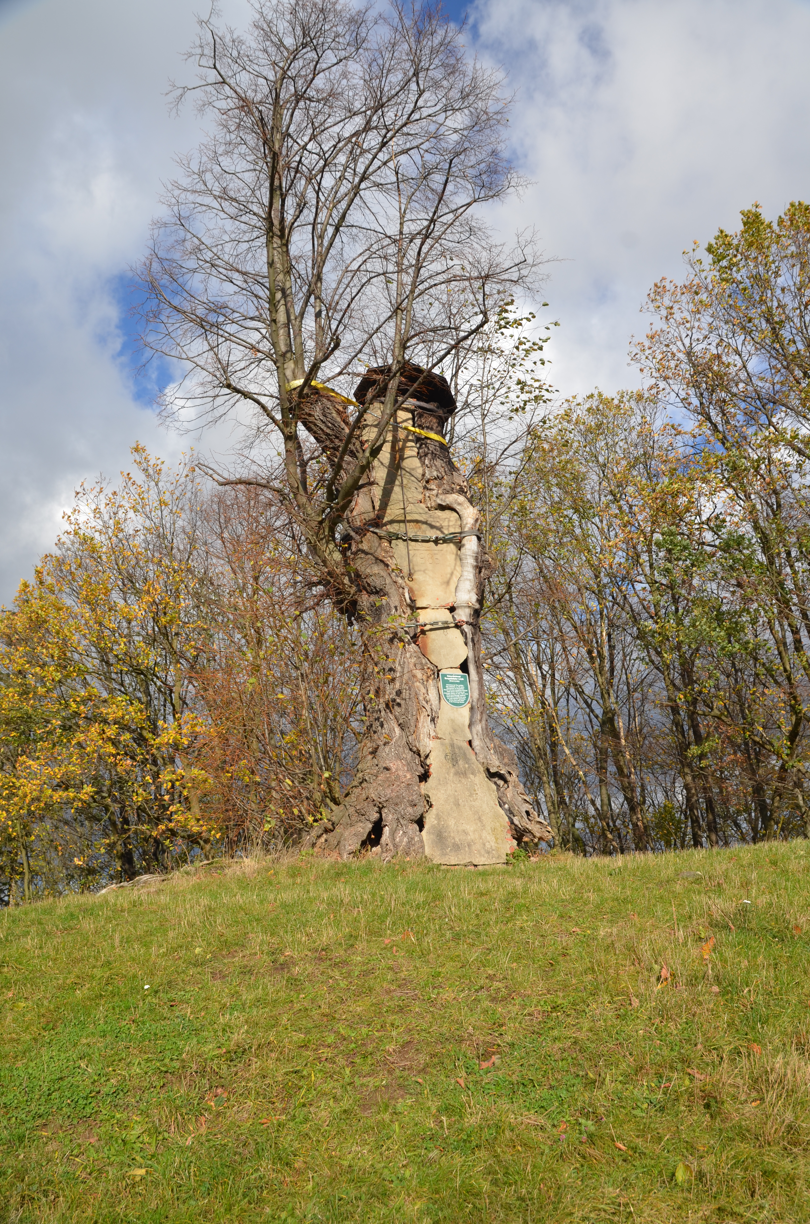 Burgstädteler Linde